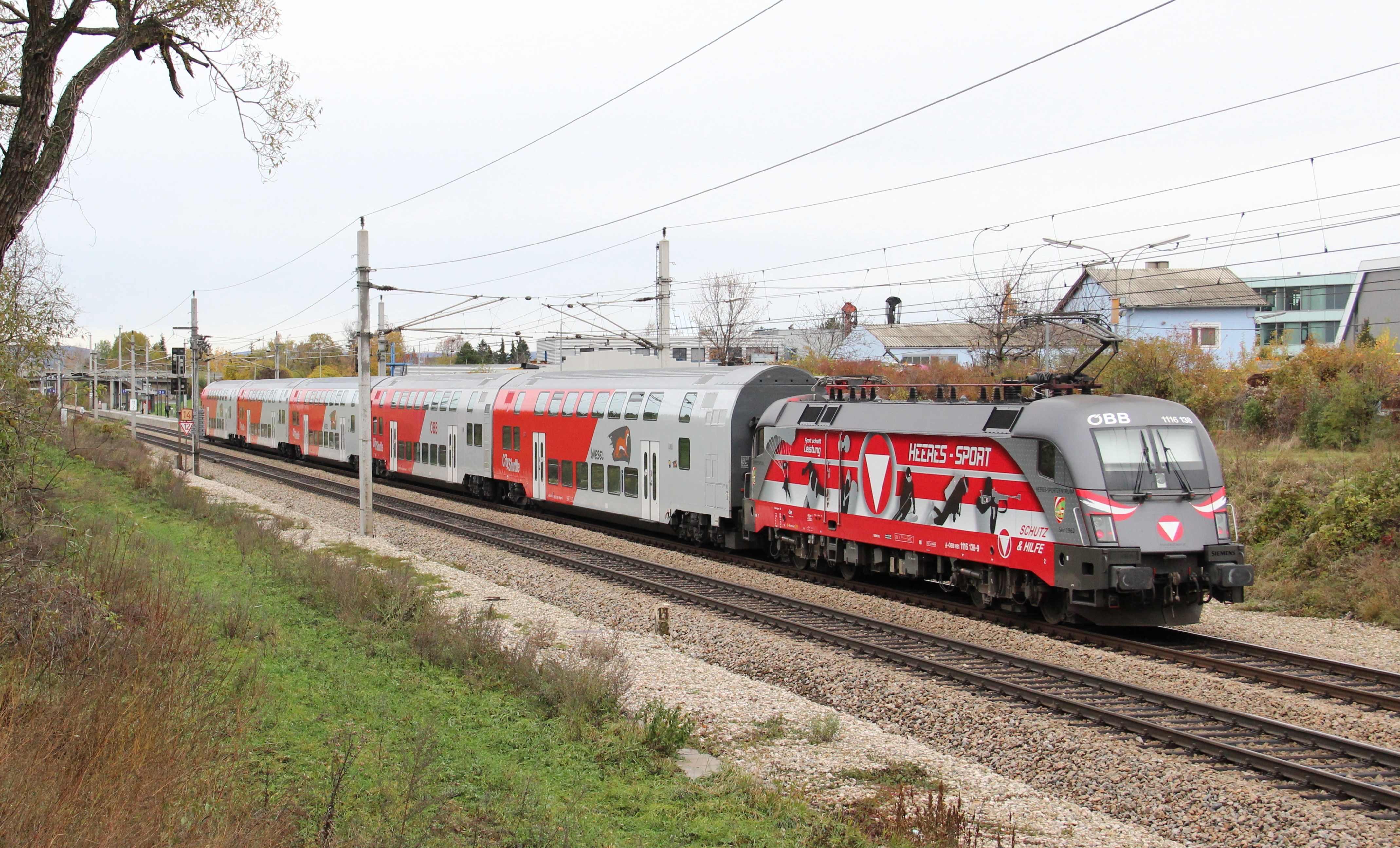 Die 1116.138 "50 Jahre Heeressport" schiebt hier den Regionalzug 2338 von Payerbach-Reichenau nach Bernhardsthal und durchfährt die Haltestelle Perchtoldsdorf.